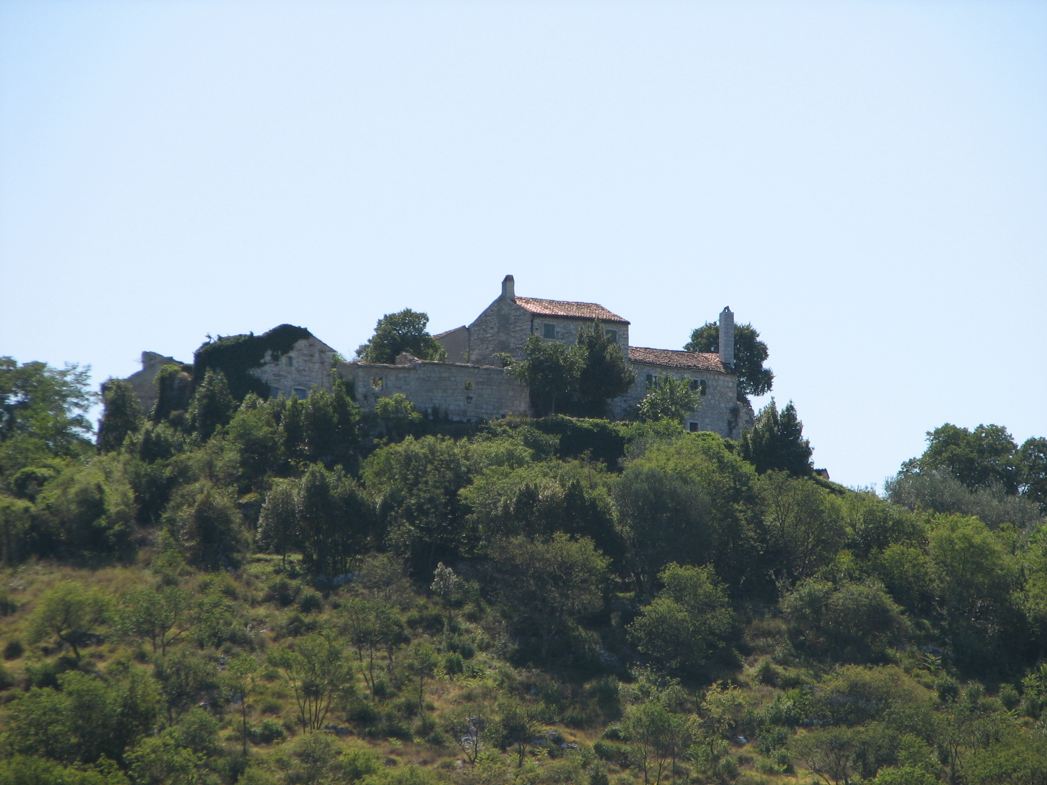 Kaštel, village near Buje, Croatia